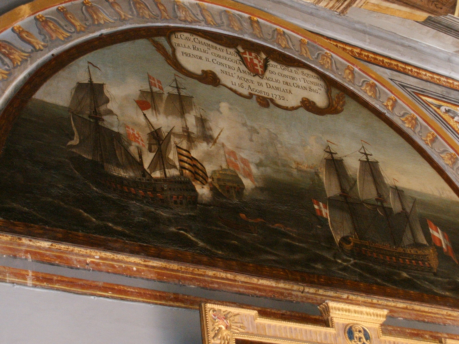 Fresko im Großmeisterpalast von Malta, sie zeigt ein Ereignis vom 16. August 1732, bei dem Jacques Francois de Chambray, Admiral der Flotte des Malteserordens einen Angriff auf einen Osmanischen Konvoi vor Damiette (Ägypten) wagt. Vorne links im Bild ist das osmanische 70-Kanonen-Flaggschiff "Sultana" (auch "La Sultana" oder "La Sultane Réal de Constantinople" bezeichnet) zu sehen, das von den beiden Linienschiffen "Saint-Antoines" (auch als "San Antonio" bezeichnet) und "Saint-Georges" (auch als "San Giorgio" bezeichnet) des Ordens entmastet wird. De Chambray gewinnt das Seegefecht und wird dafür mit dem Großkreuz des Malterserordens ausgezeichnet.